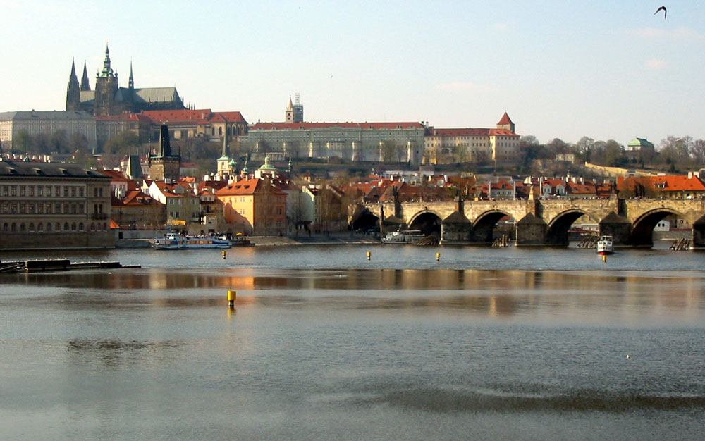 Vltava jõgi Prahas, tagaplaanil Karli sild, Malá Strana ning Hradčany.